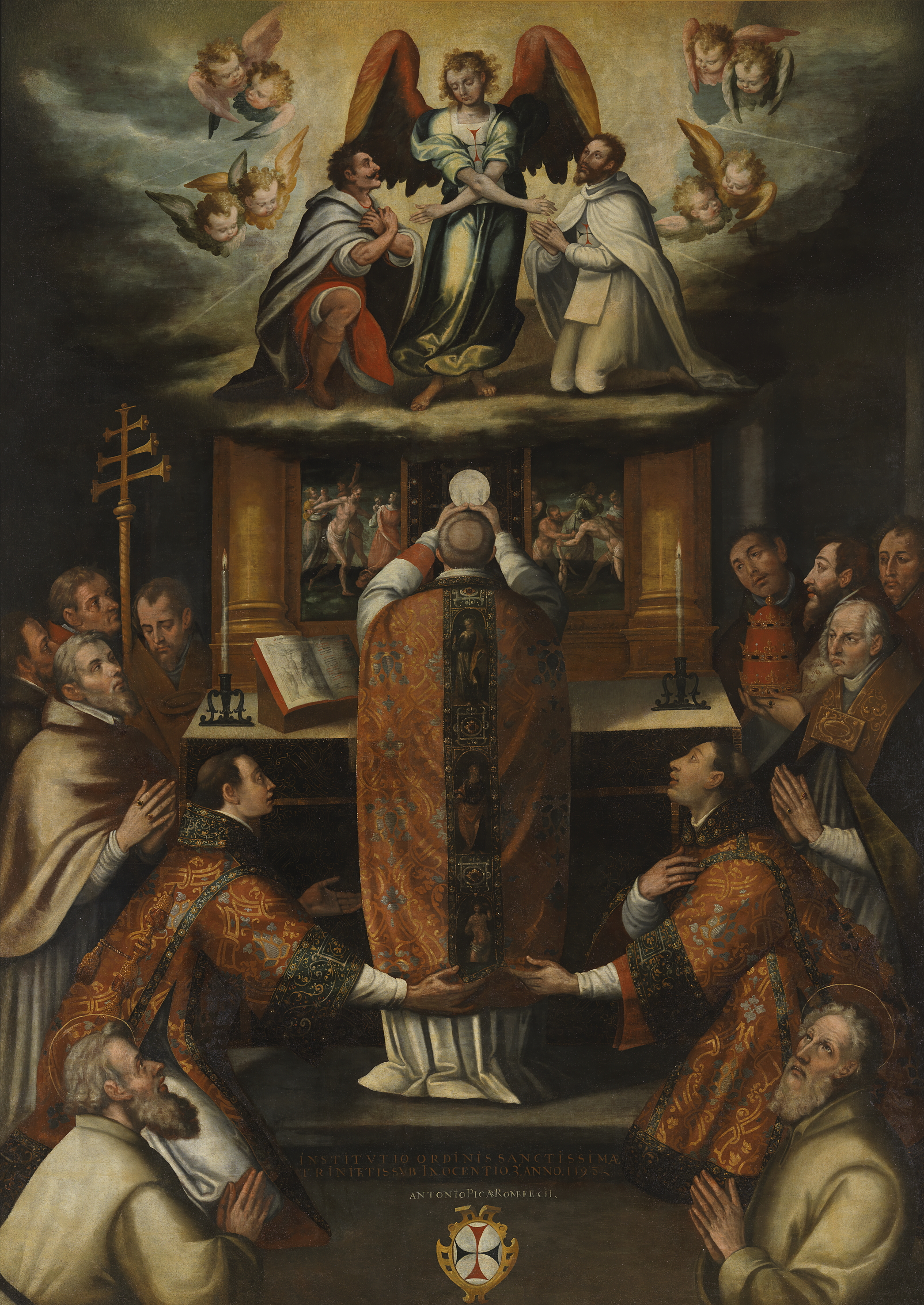 La obra representa la institución de la Orden Trinitaria, que fue aprobada en 1198 por el papa Inocencio III.